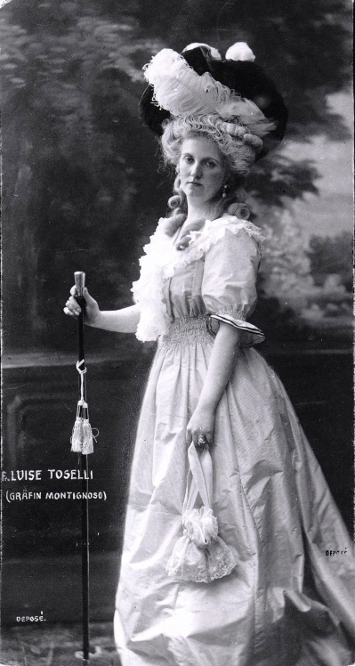 Luisa di Toscana (1870-1947)